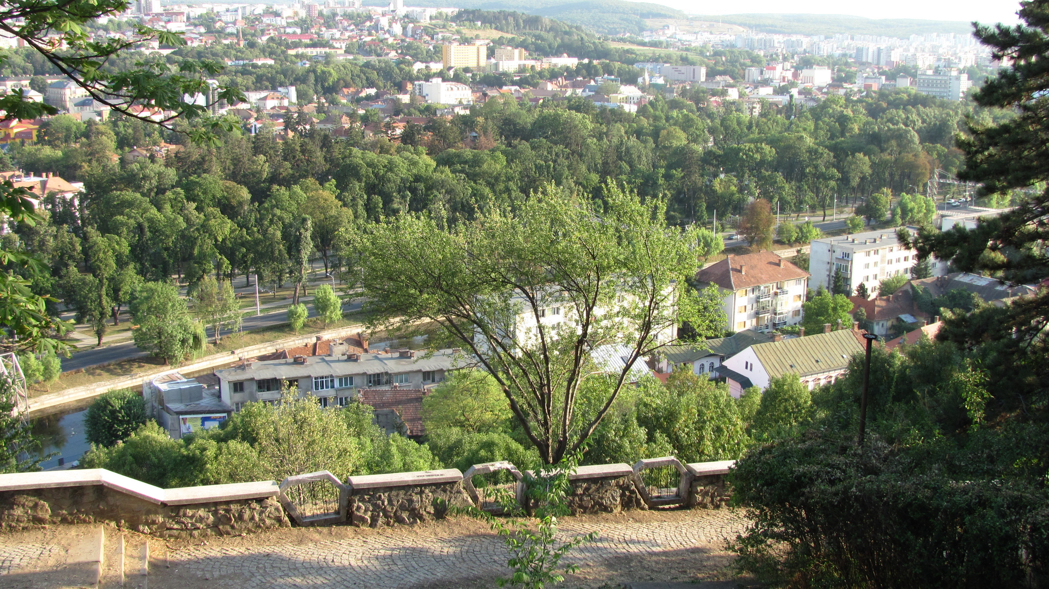 Cluj-Napoca - Parcul Simion-Bărnuțiu - Vedere de pe Dealul Cetățuia